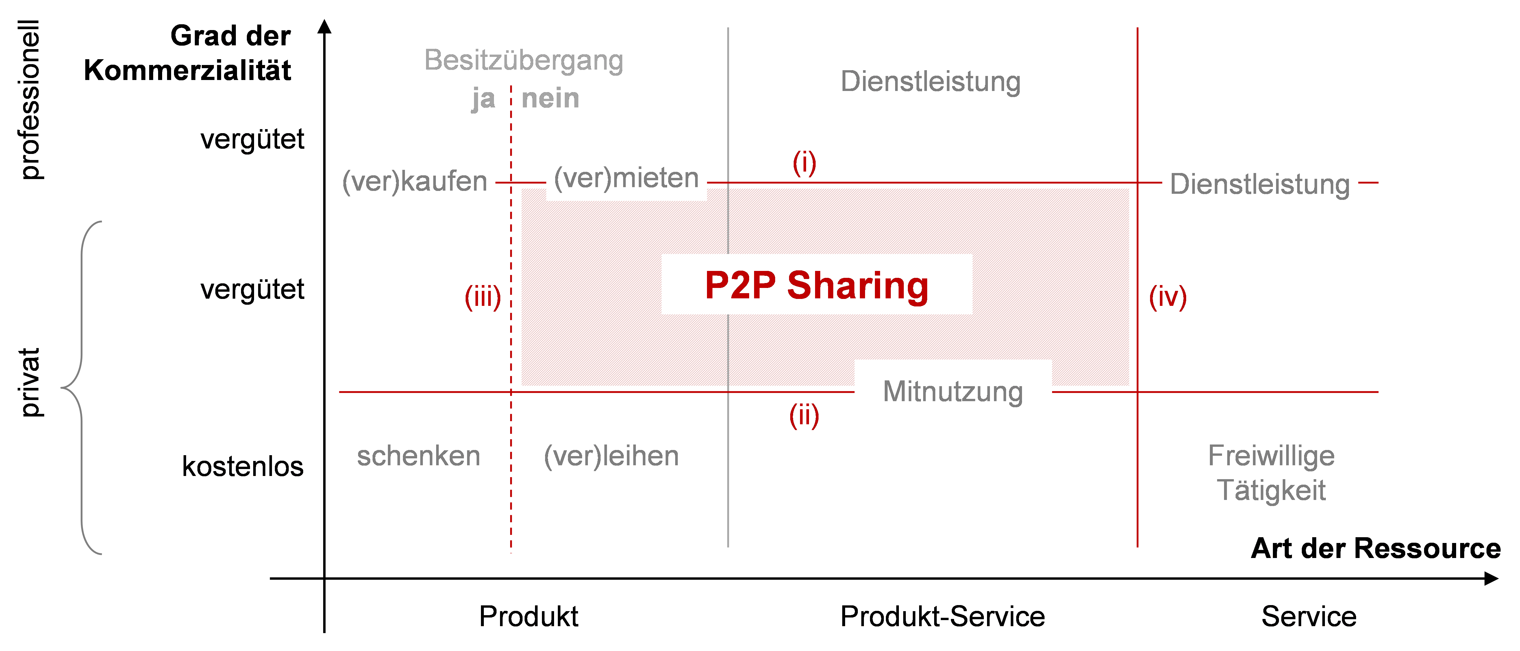 Das Schaubild illustriert den durch die Abgrenzungskriterien aufgespannten Raum, dem gemeinhin Geschäftsmodelle der Sharing Economy (P2P Sharing = Peer-to-Peer-Sharing) zuzuordnen sind.